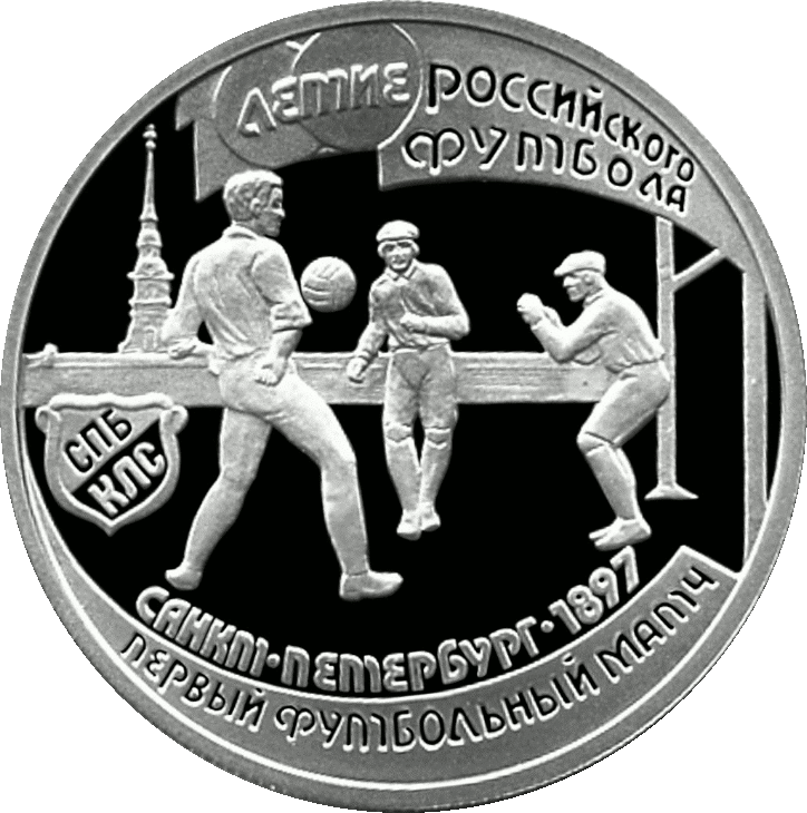 Монета Банка России — 100-летие Российского футбола, 0019, 1 рубль